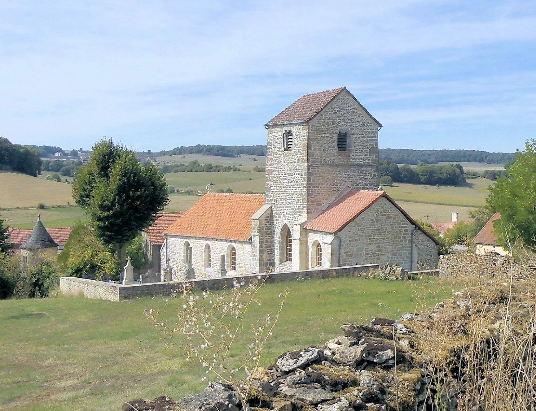 L'église Saint-Martin d'Hâcourt